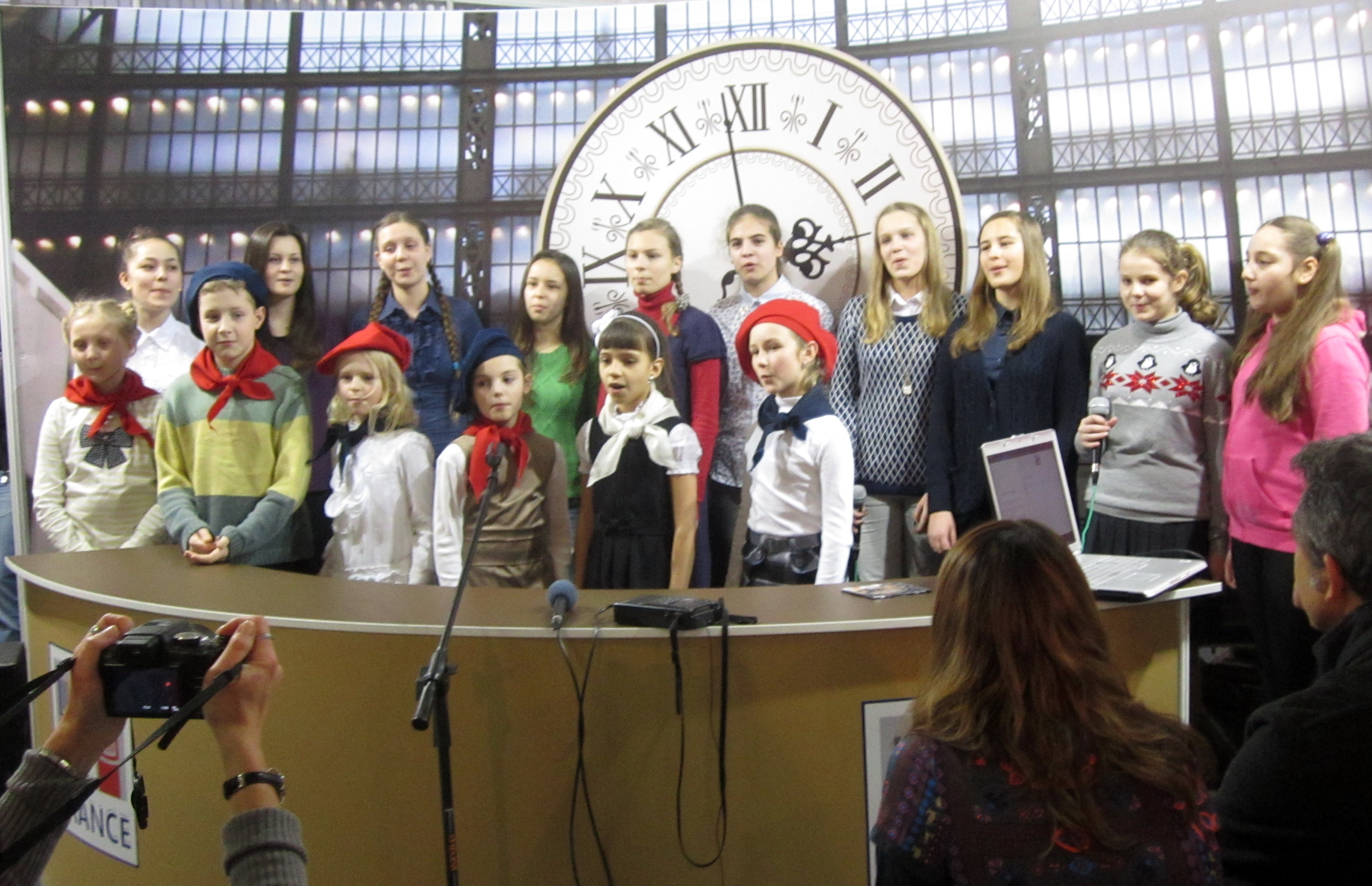 Ансамбль французской песни «Каравелла». XX Международная книжная выставка. Минск, 02.09.2013